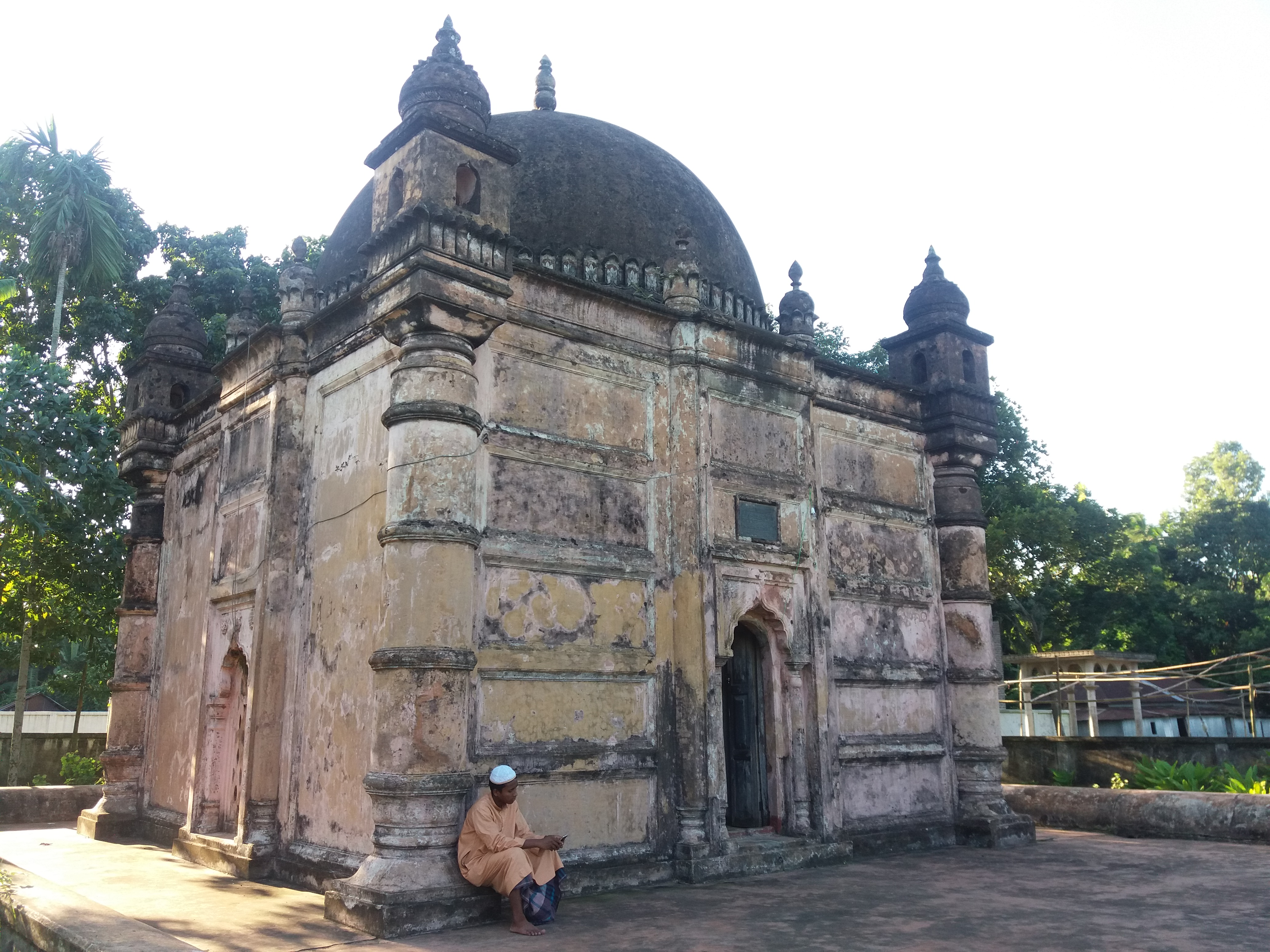 ঘাঘড়া খান বাড়ি জামে মসজিদ